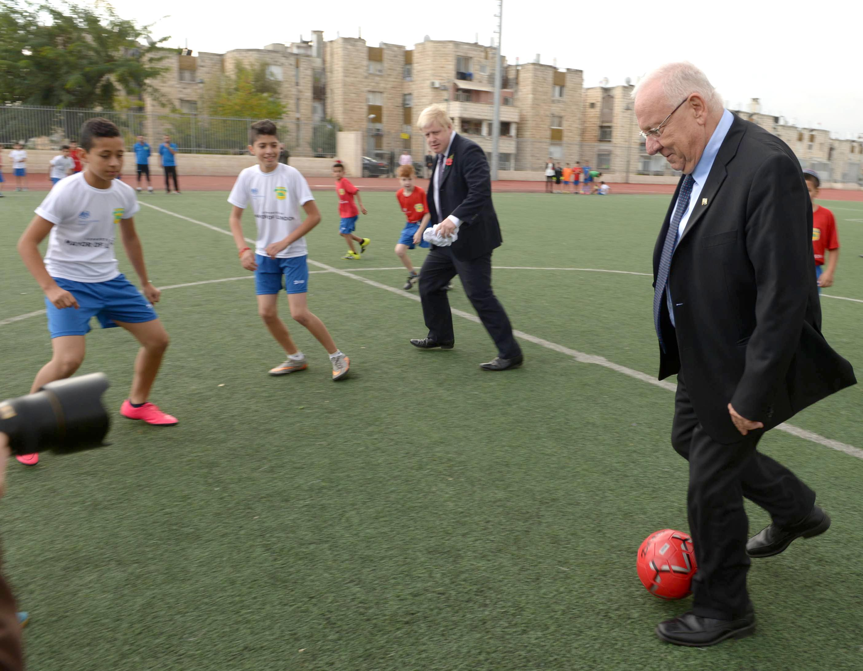 נשיא מדינת ישראל ראובן ריבלין עם ראש עיריית לונדון בוריס ג'ונסון, באירוע פתיחת עונת הכדורגל של עמותת הכדורגל של הילדים "שער שוויון"